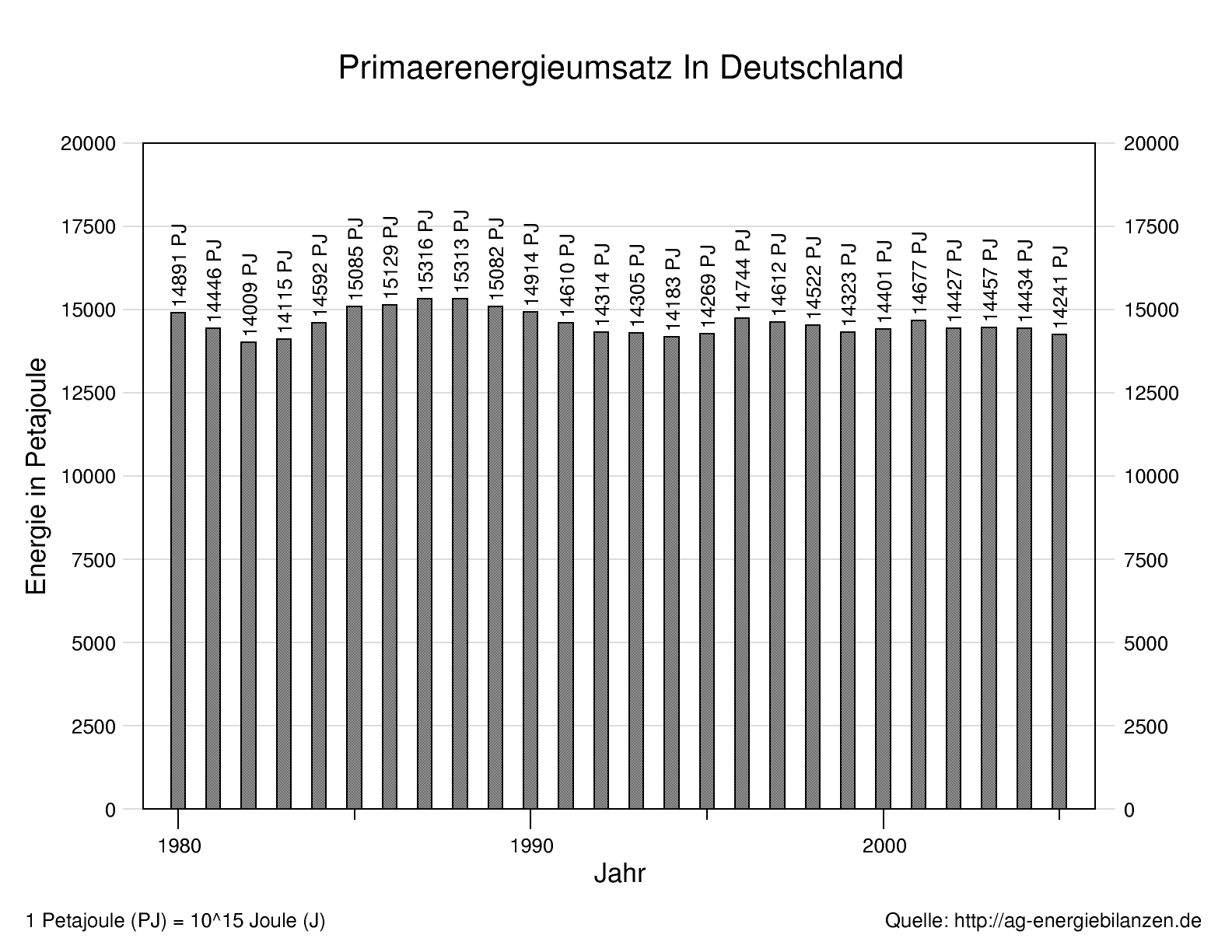 Primärenergieumsatz in Deutschland 1980 - 2005